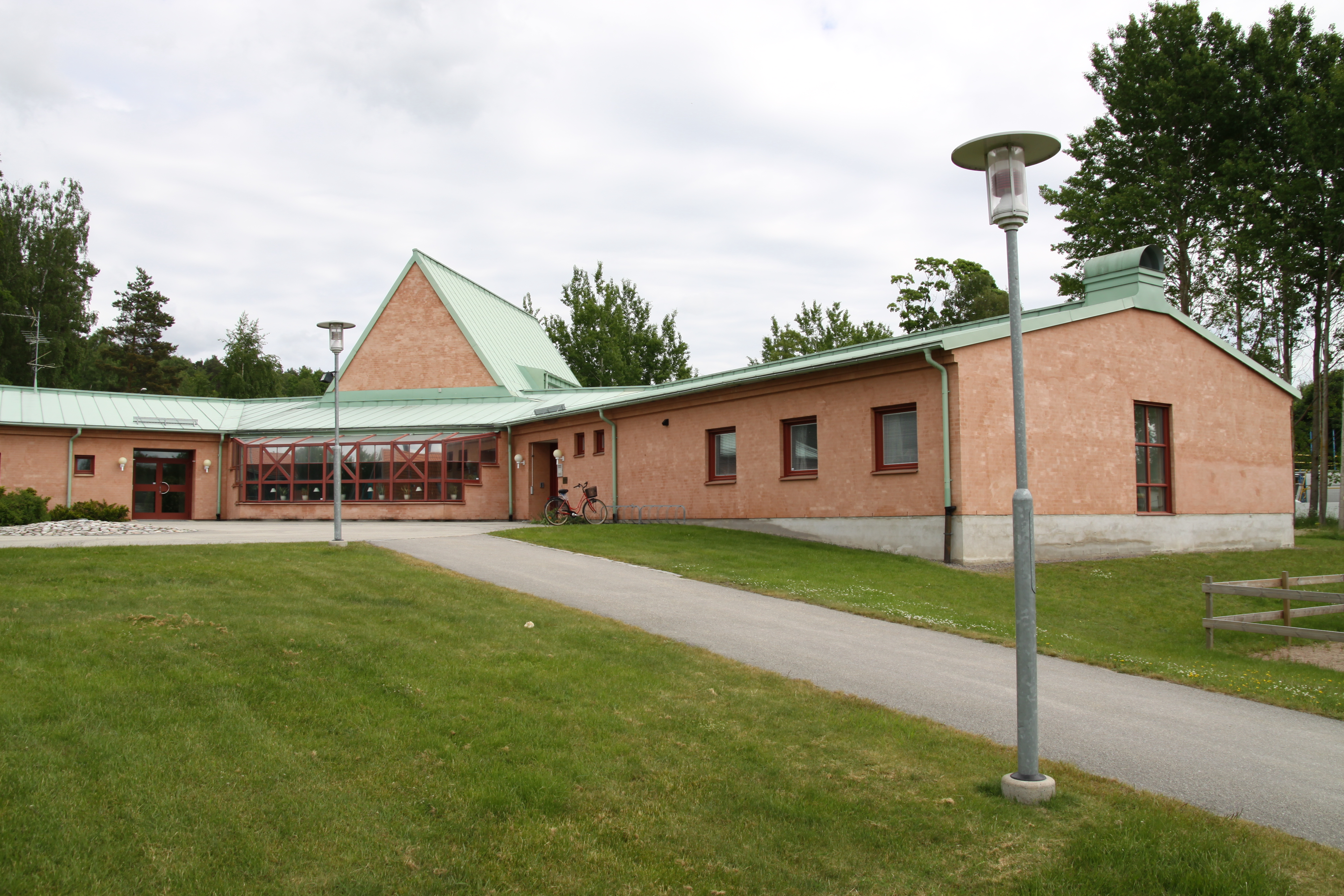 Svärtinge kyrkas exteriör